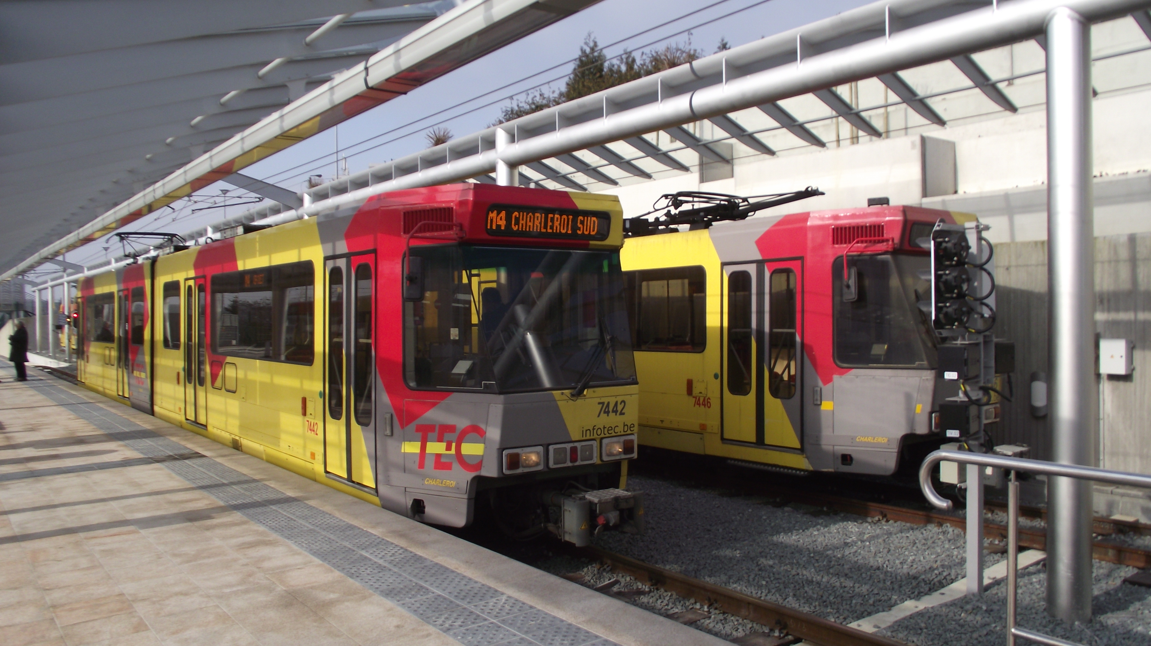 Nieuw eindpunt keerlus Soleilmont geopend op 27-02-2012. Aan de rechterkant zijn opstelsporen. De normale dienst keert via de lus.